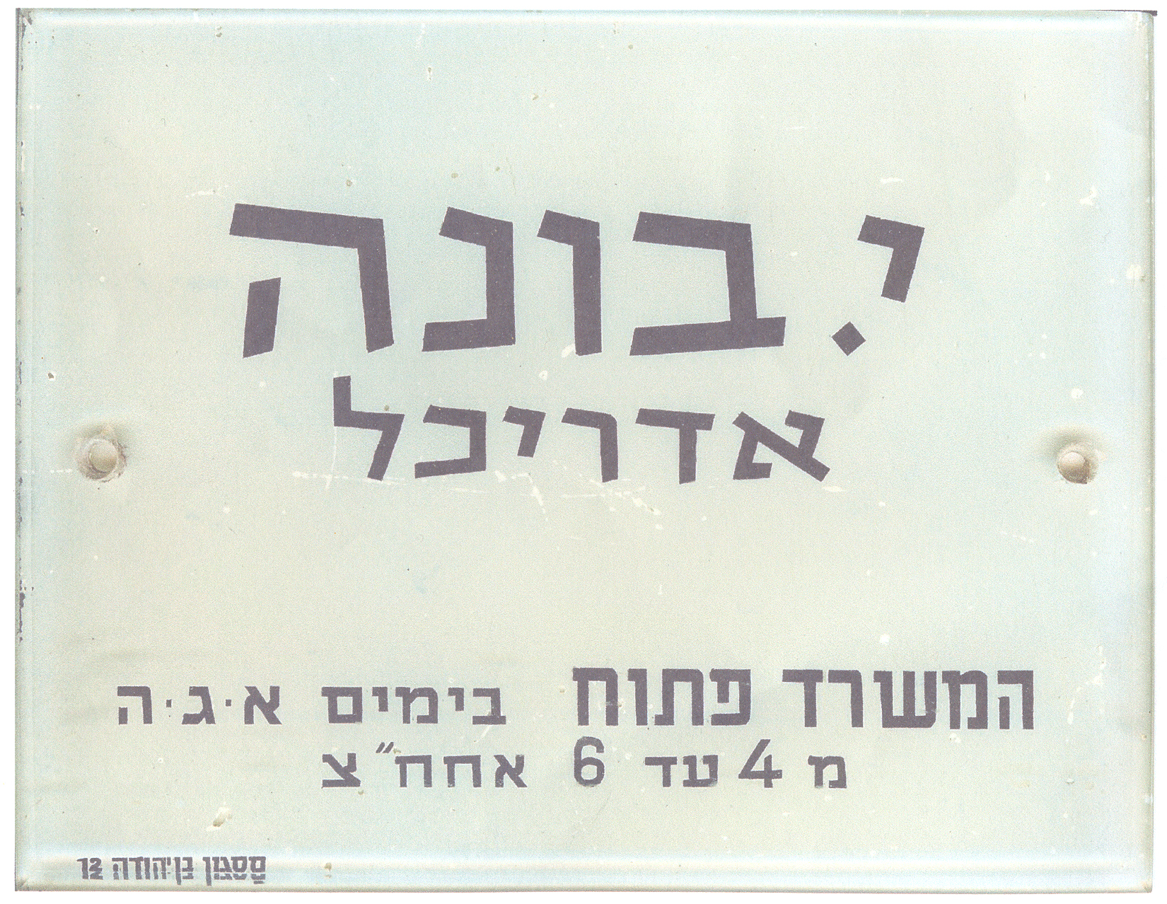 שלט משרד אדריכל י. בונה